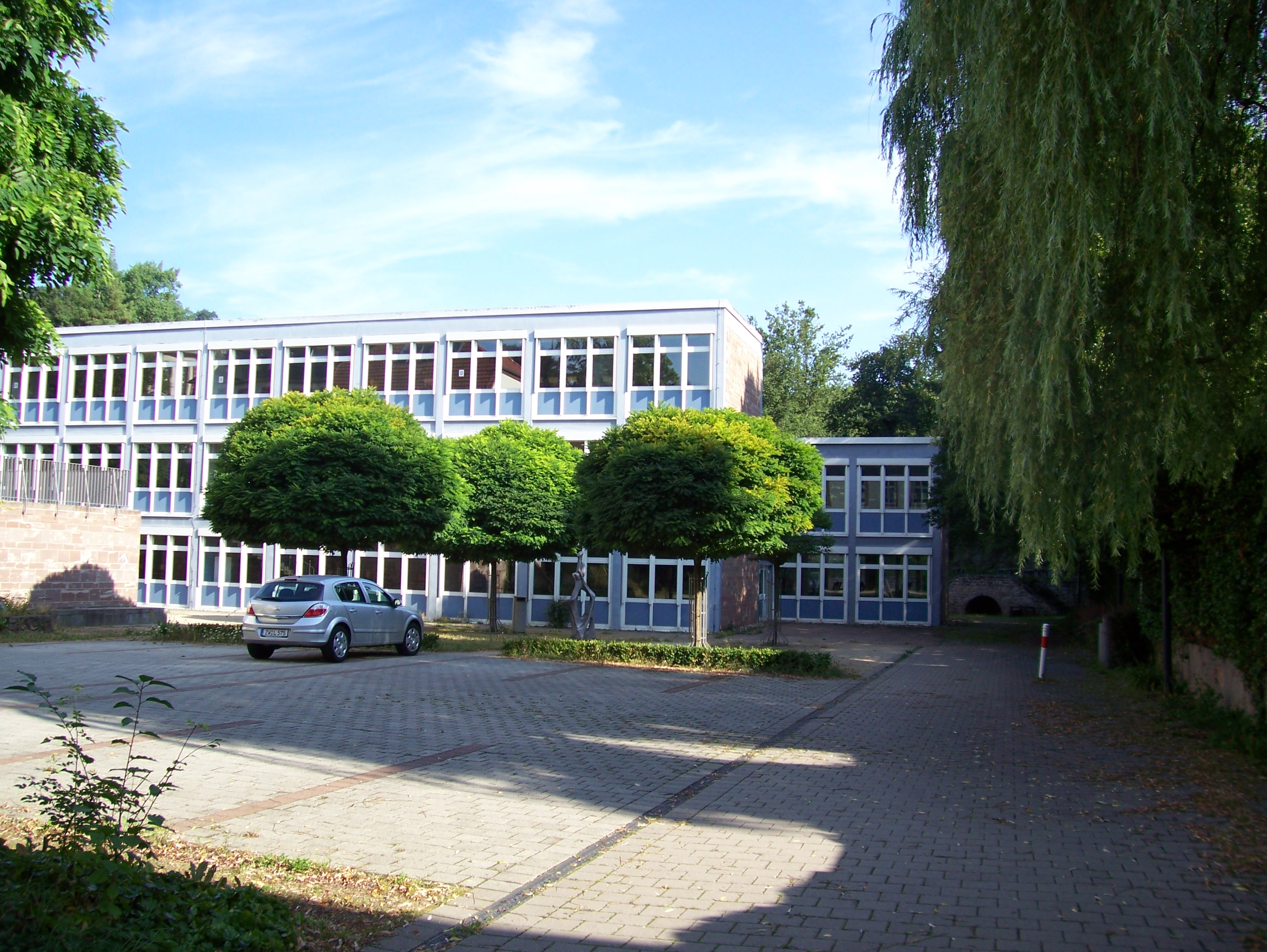 Hauptgebäude des Von der Leyen-Gymnasiums Blieskastel